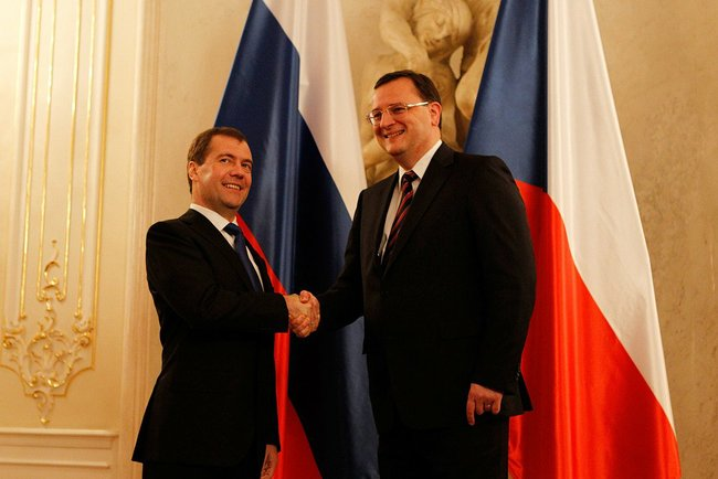 С председателем Правительства Чехии Петром Нечасом.